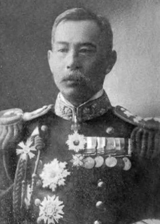 松村龍雄（1868-1932）